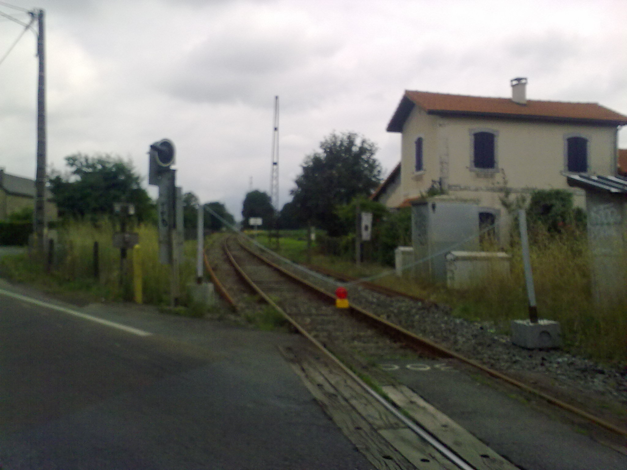 La ligne Pau-Oloron est en complète reconstruction car elle était devenue trop usée. Elle est donc fermée 6 mois comme le montre cette photographie avec un câble qui bloque l'accès à des véhicules, comme des quads qui auraient pu circuler sur le chantier de 35 Km de long.